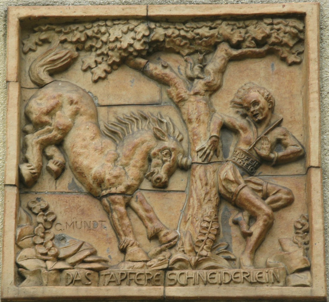 Das tapfere Schneiderlein, Terrakottarelief von G. Mundt, Johann-Mithlinger-Siedlung, Raxstraße 7-27, Wien-Favoriten